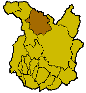 Localisation de la commune de San Marcello Pistoiese à l'intérieur de la province de Pistoia.